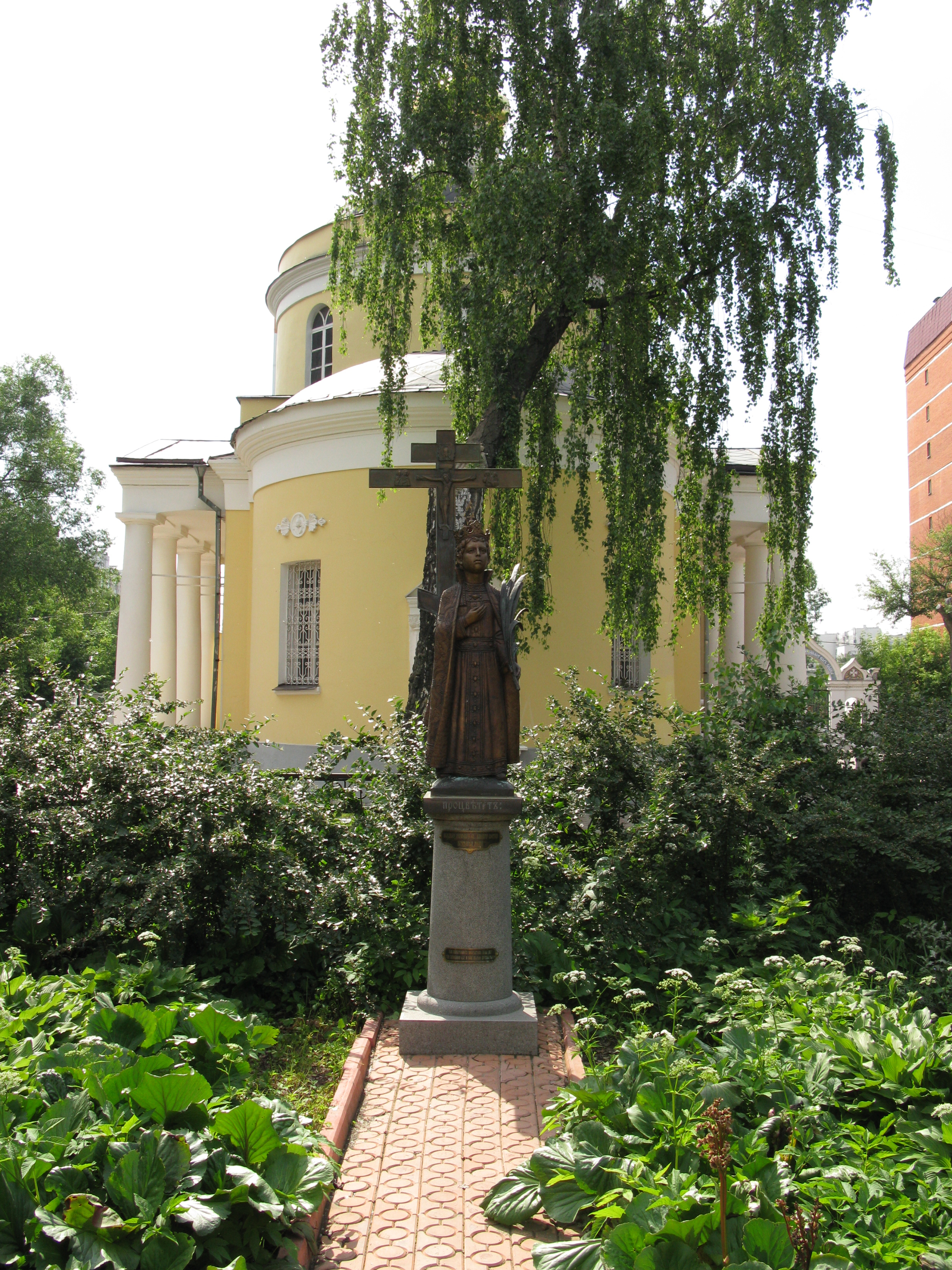 Памятник Святому благоверному царевичу Димитрию Угличскому. Открыт 21 августа 2008 года в день престольного праздника.